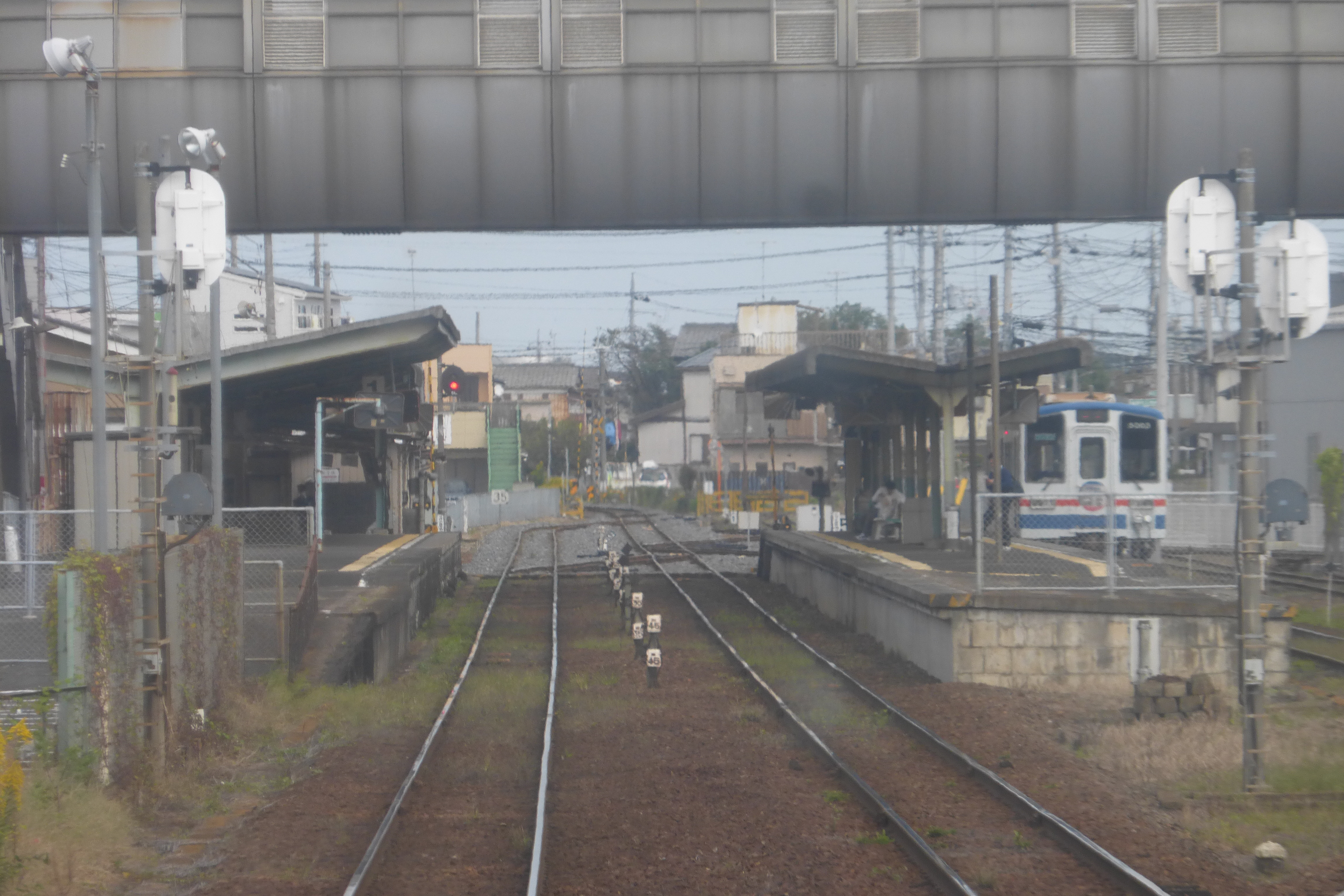 Mitsukaidō Station (水海道駅)